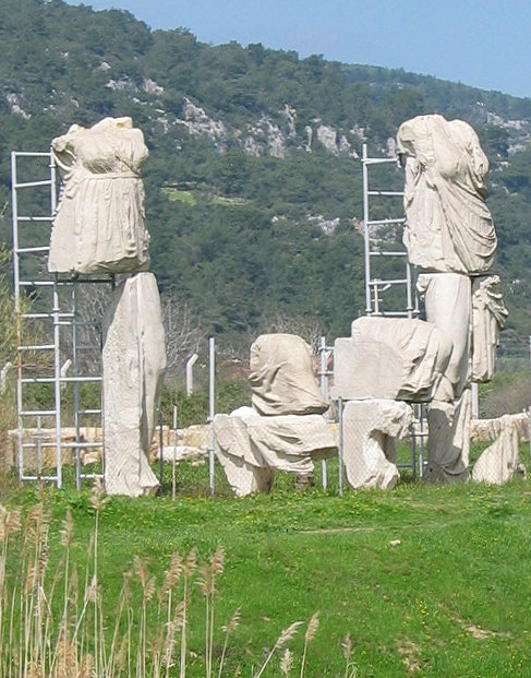 Hellenistische Kultstatuen in Klaros (Westtürkei)